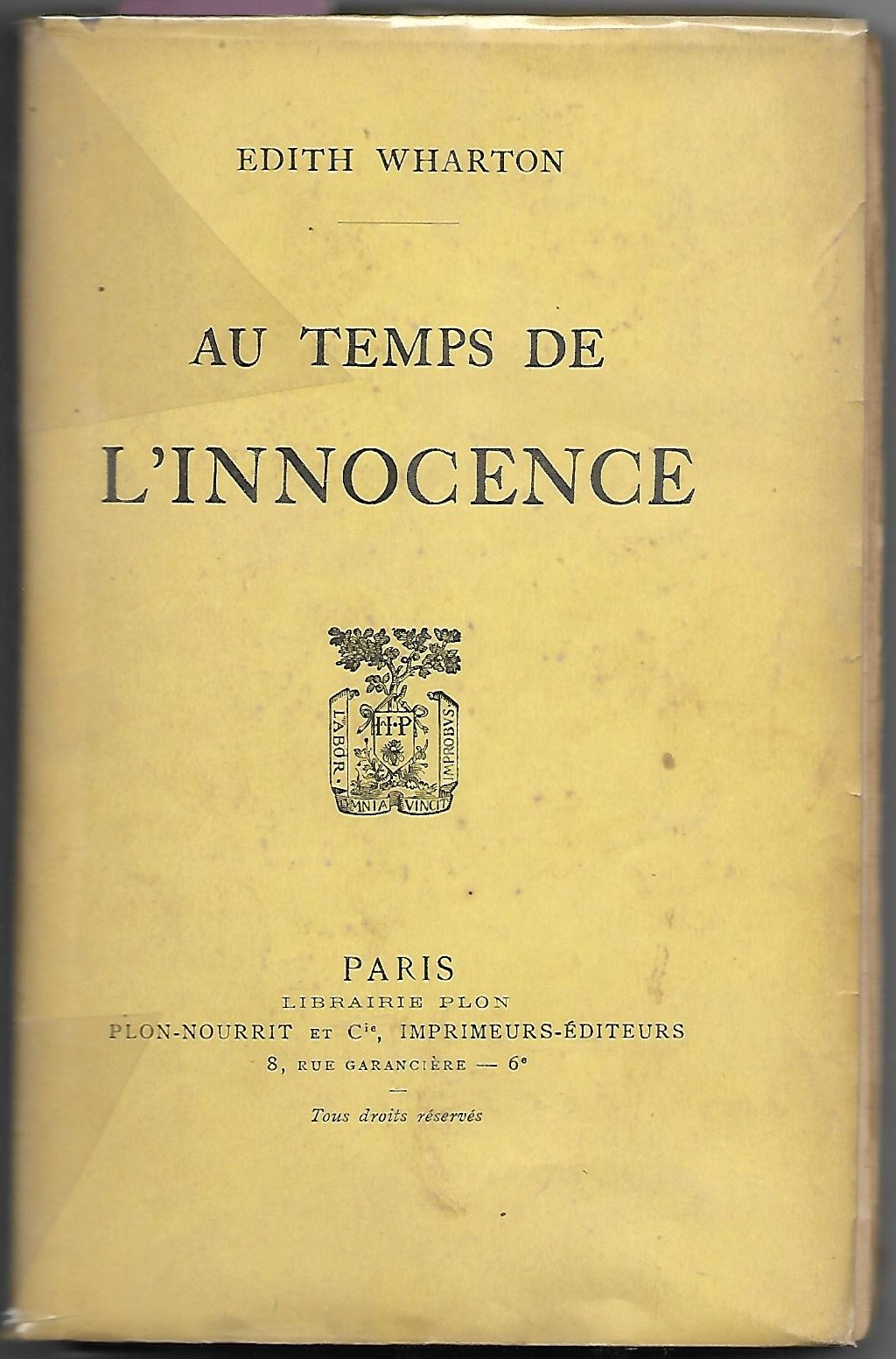 Couverture de la première édition française